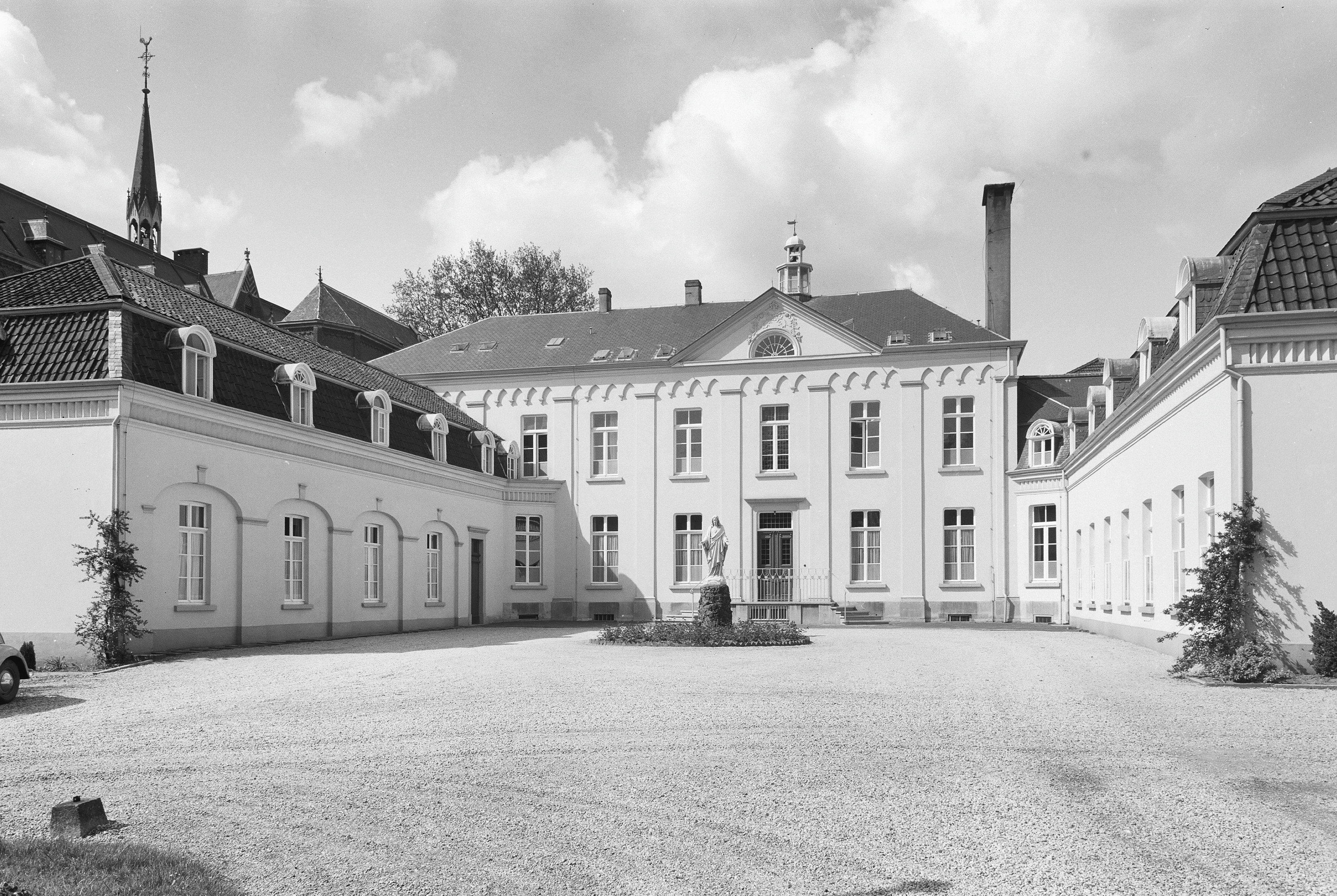 Sint Jozef Klooster: aanzicht